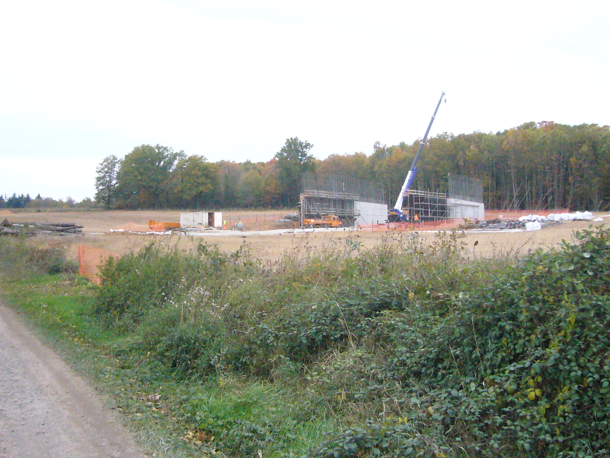 Travaux relatifs à la mise en 2x2 voies de la RN 141 entre Saint-Junien et Chabanais (Charente, France)